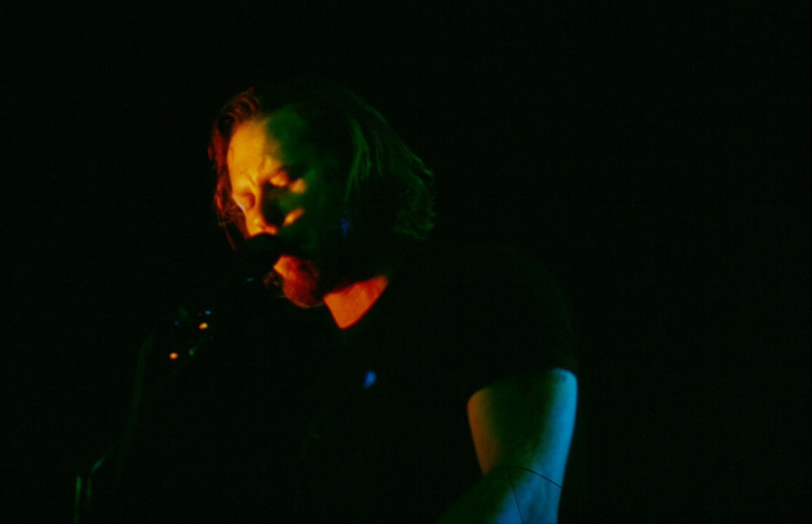 Photo de James Hetfield lors d'un concert.